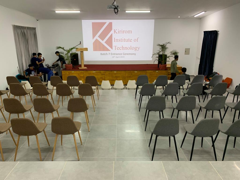 キリロム工科大学 ホール